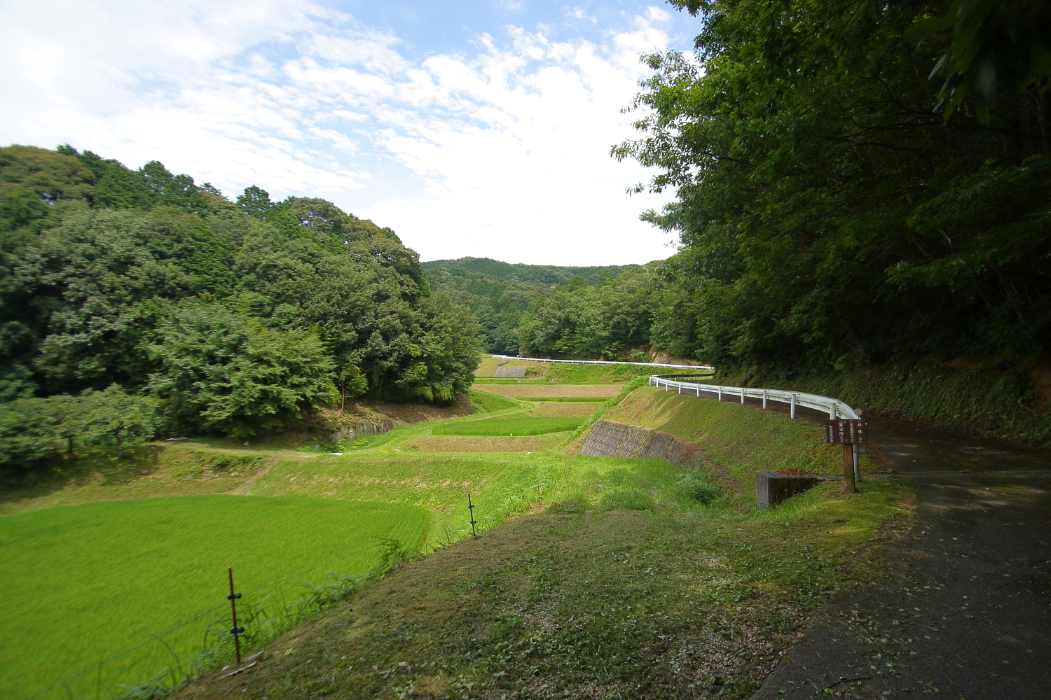 田園風景（豊田市松平町、2009年（平成21年）7月）